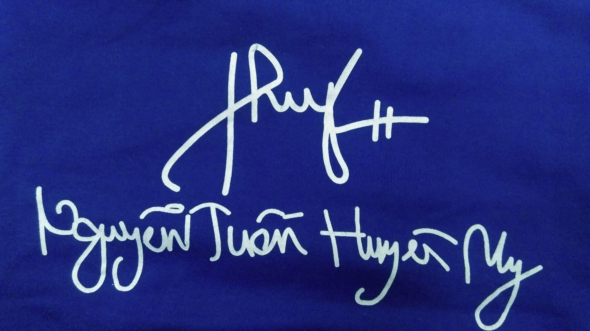 Chữ Ký của Huyền My